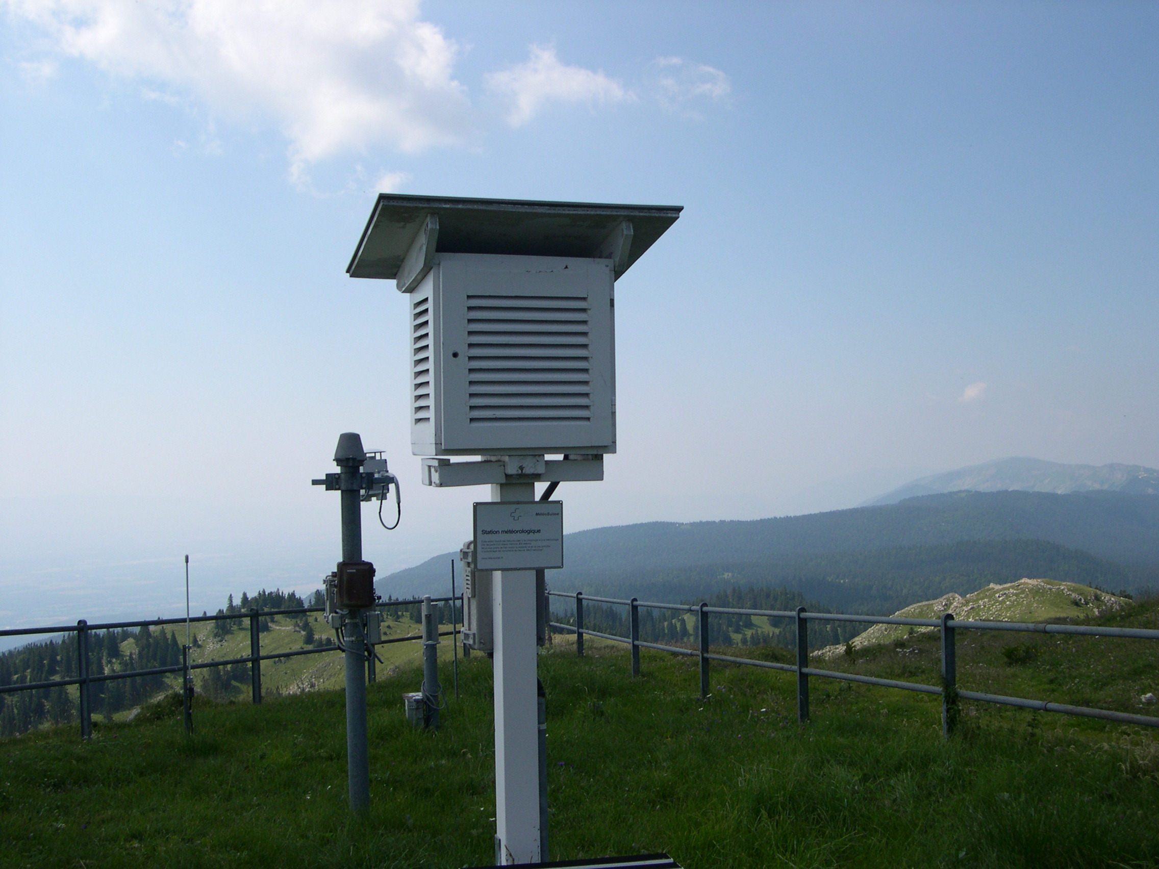 Vue de la station météo automatique de Météosuisse au sommet de La Dôle, 1677m, dans le Jura vaudois en Suisse. Photo S.Nueffer.Libre de droit.